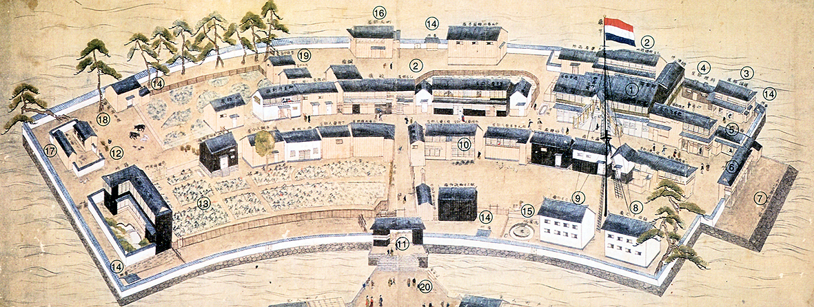 "План Дедзіми в Нагасакі" картина 18 століття Кавахари Кейга (зберігається в бібілотеці університету Нагасакі) 1. Кімната капітана (カピタン部屋) 2. Кімната старшого наглядача (乙名部屋) 3. Кімната перекладачів (通詞部屋) 4. Кухня (料理部屋) 5. Кімната спостерігача (検使部屋) 6. "Водяні ворота" (水門) 7. Причал (荷揚場) 8. Комора А (イ之蔵) 9. Комора В (ロ之蔵) 10. Кімната голландського хірурга (外科蘭人部屋) 11. Головні ворота (表門) 12. Спальня (花園玉突場) 13. Сад і город (花畠) 14. Сторожка (番所) 15. Пральня (洗濯場) 16. Кімната міщан (町人部屋) 17. Свинарник (豚小屋) 18. Корівник (牛小屋) 19. Теслярня (大工小屋) 20. Місце оголошень (制札場)